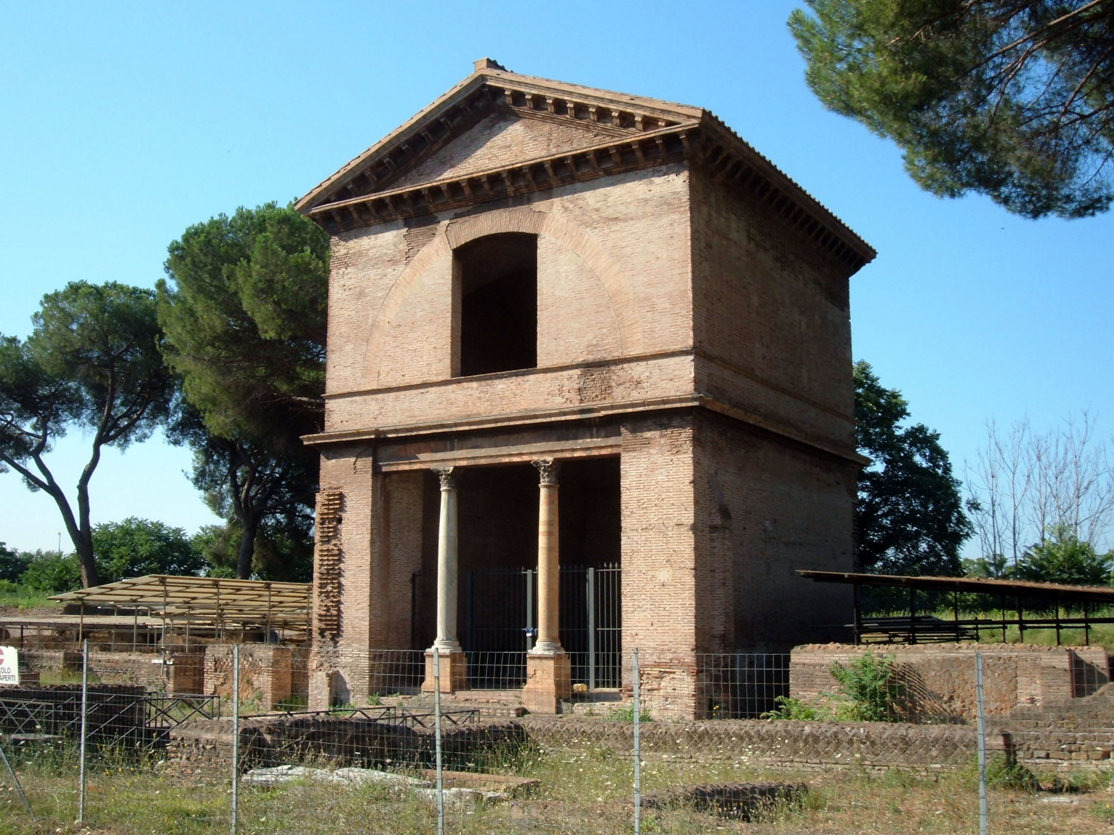 Parco archeologico delle Tombe della via Latina. Tomba dei Valeri (ca. 160 d.C.).